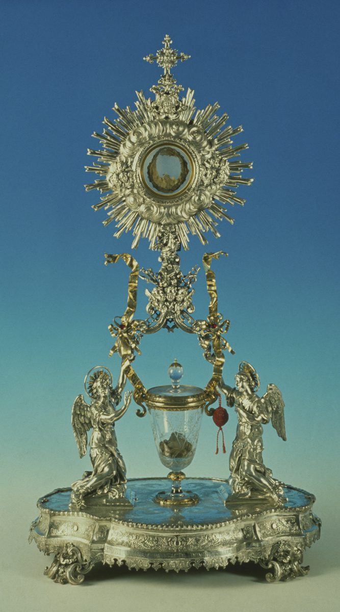 visione d'insieme dell'ostensorio del miracolo eucaristico di Lanciano ch